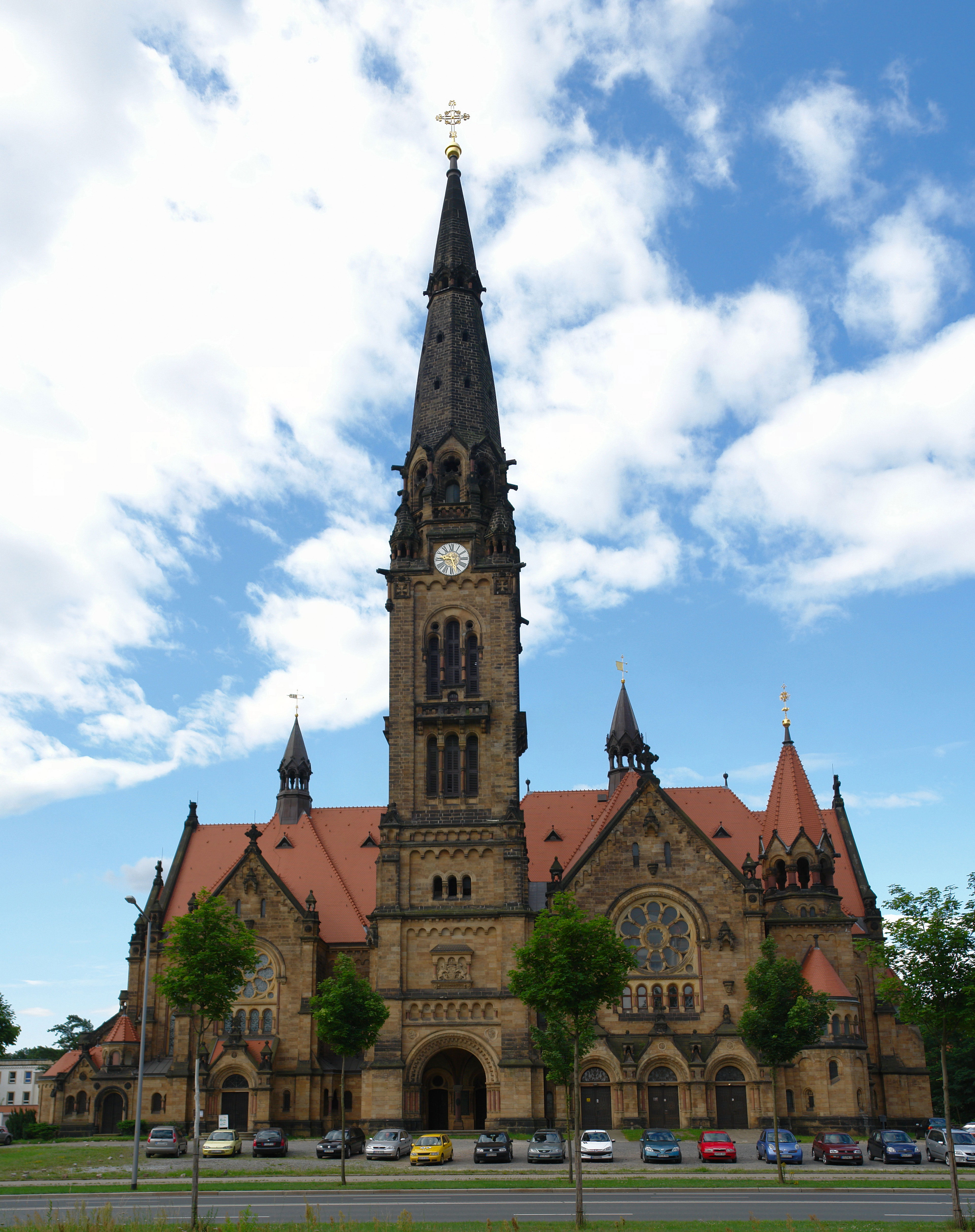 Nordseite der Garnisonkirche Dresden